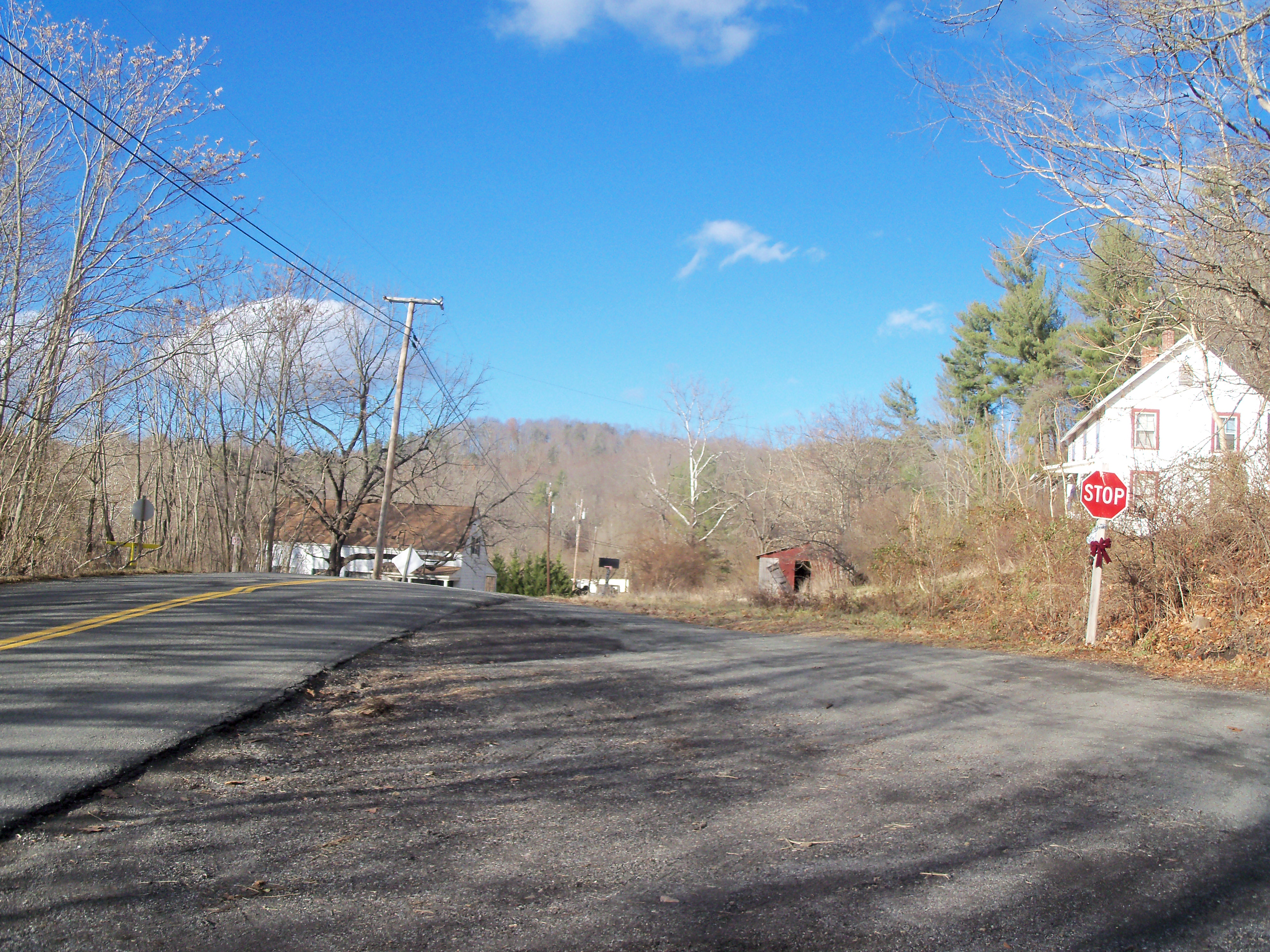 Ingles, VA, USA